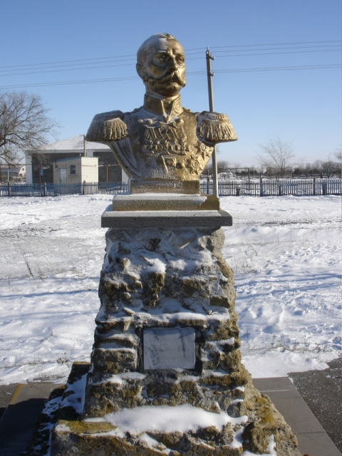 Дубовая-Балка(Памятник царю Александру II)